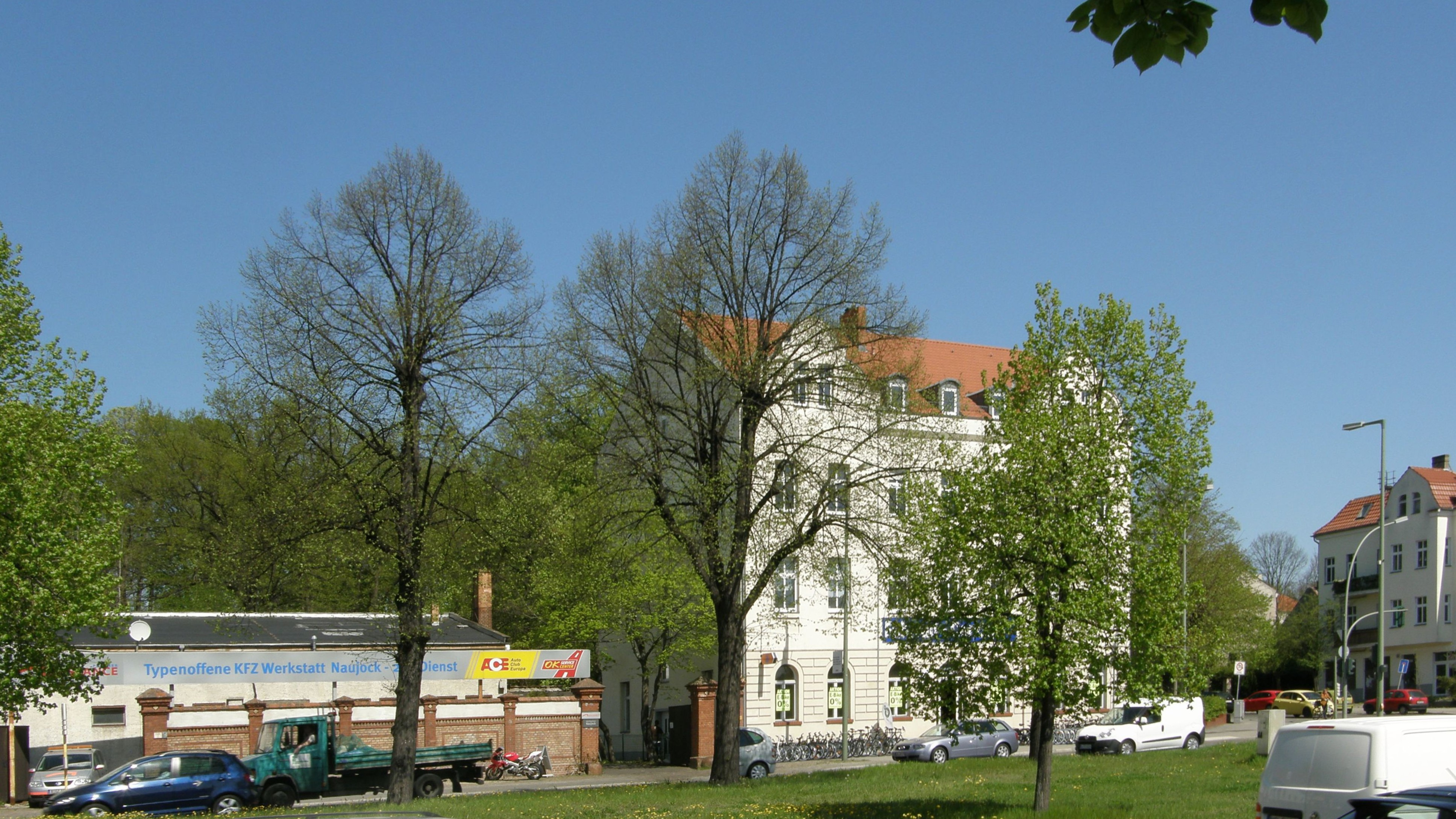 Berlin-Biesdorf, Baudenkmale an Alt-Biesdorf: Nr. 64 mit Mauer